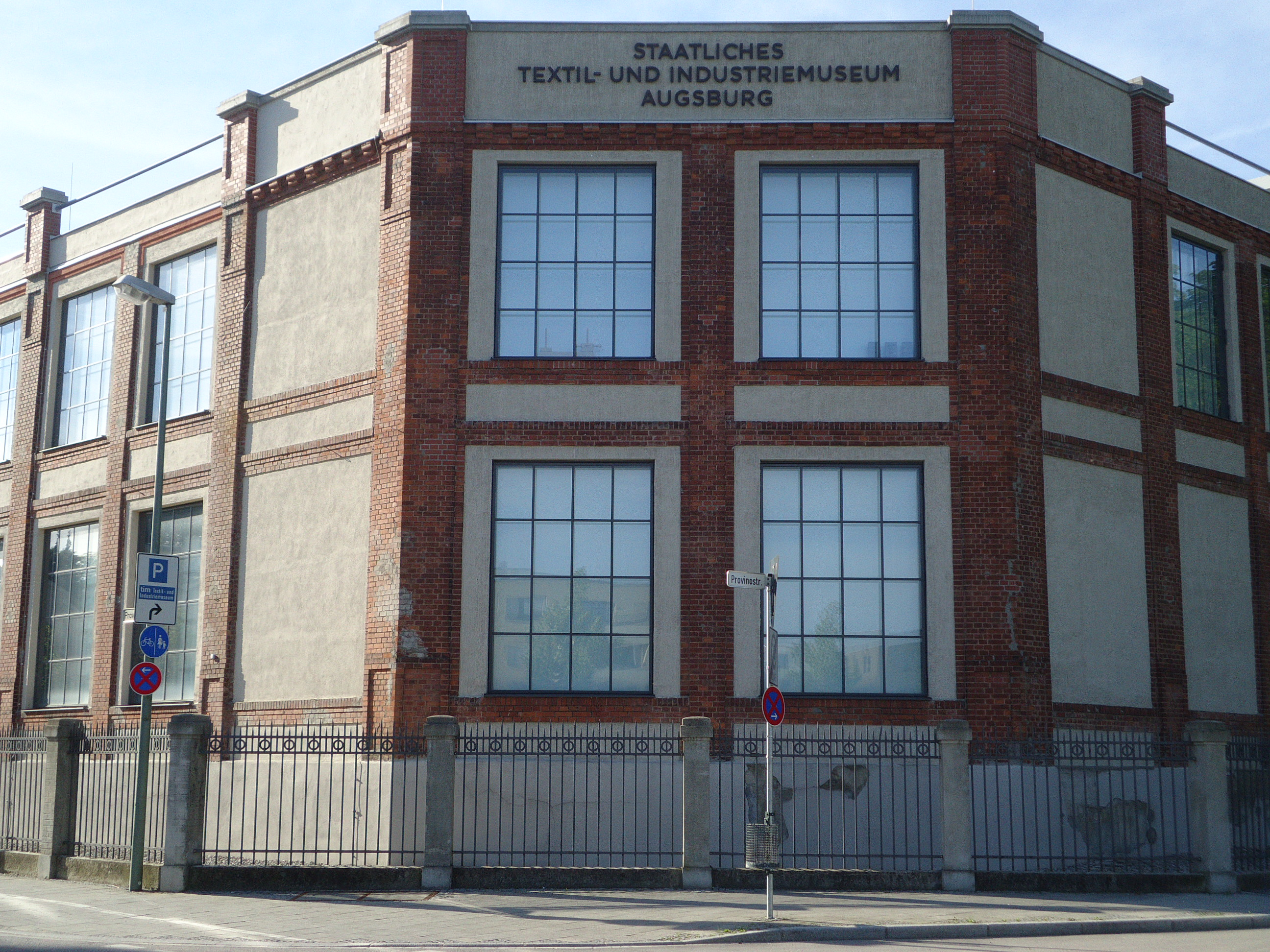 Ansicht des Textilmuseums in Augsburg an der Provinostraße